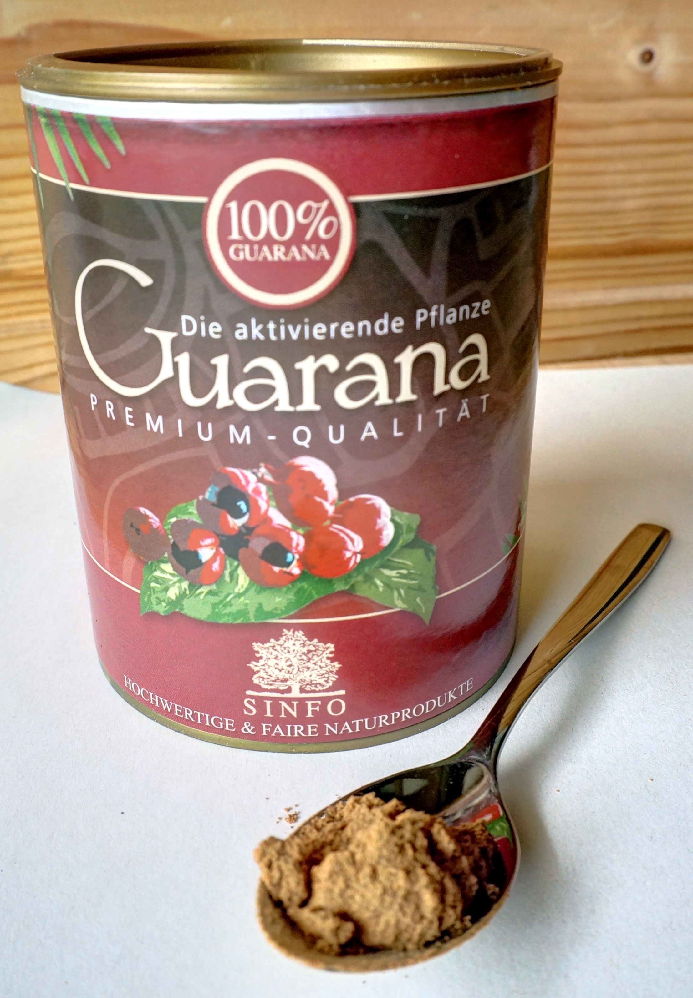 Guarana Pulver, 100 Gramm, Firma: Sinfo